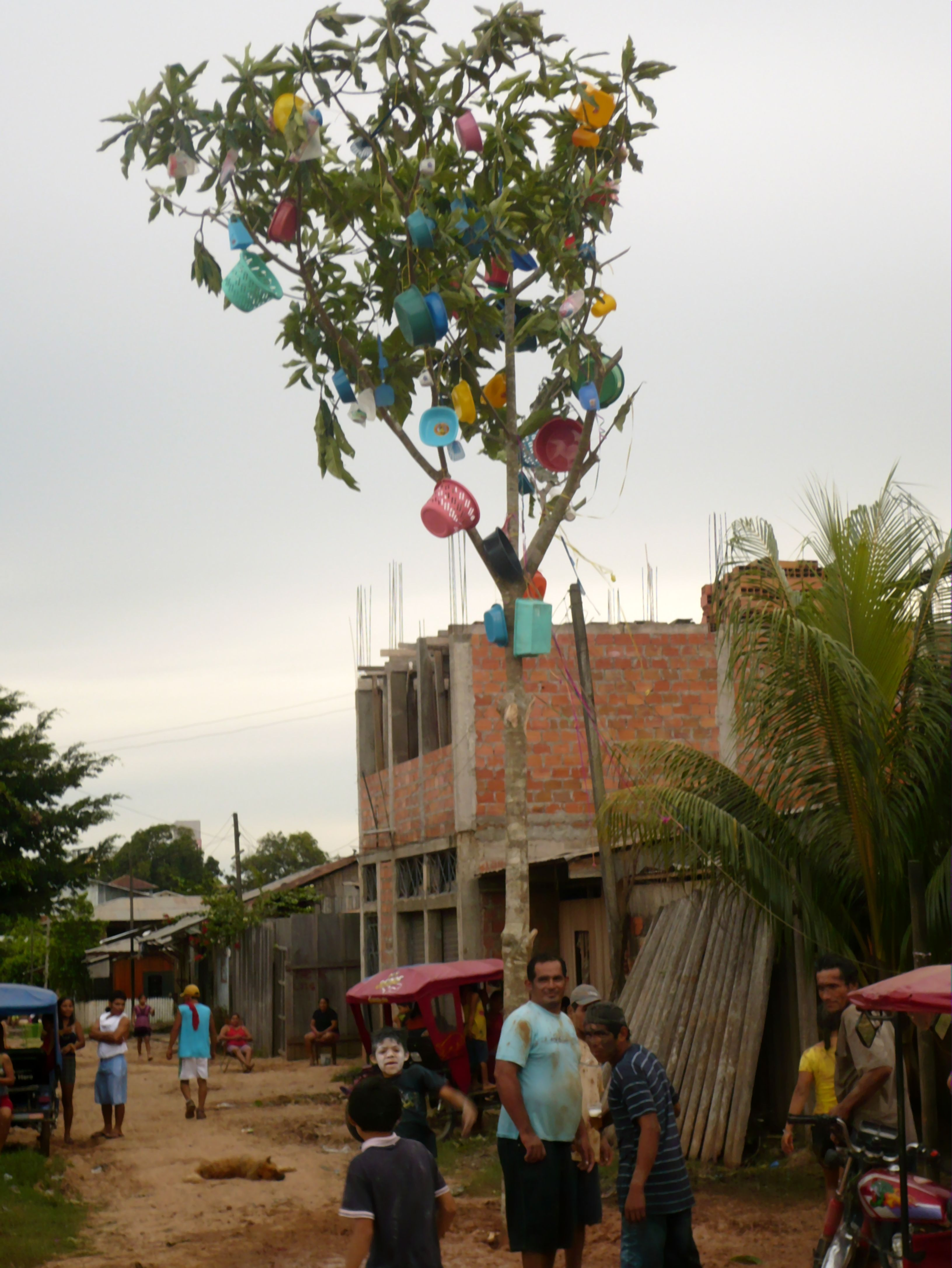 La humisha, es el objeto del carnaval de Ucayali. Popularmente usado como medio festivo.